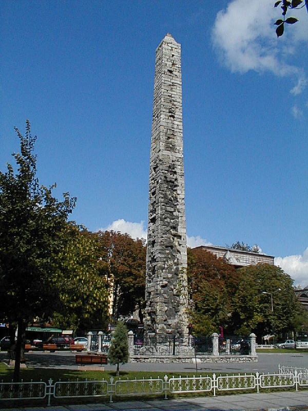 Bilder aus Istanbul